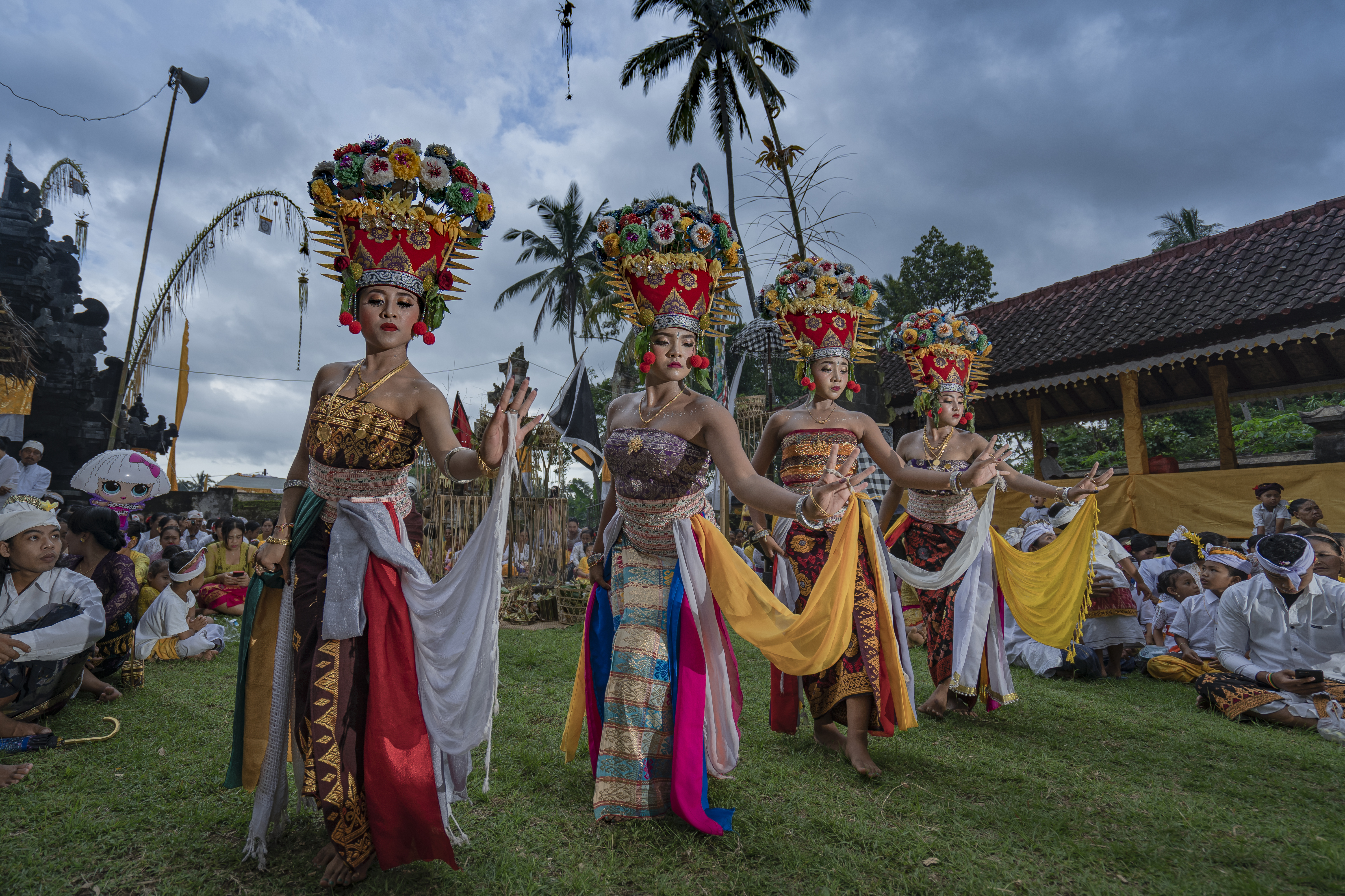 Tari Rejang adalah tarian suci untuk menyambut kedatangan para Dewa dari Kahyangan yang turun ke bumi. Ritual ini ditarikan dengan lemah gemulai, penuh rasa pengabdian kepada Dewa Dewi, dengan gerakan yang lambat dan sederhana, karena lebih berfokus pada nilai spiritual di dalamnya. Para penarinya mengenakankan pakaian upacara adat kuno yang penuh warna dengan hiasan kepala (gelungan) yang unik yang dibuat sedemikian rupa dari bahan bunga, buah, dan bahan lainnya yang merupakan khas desa setempat. Tarian ini biasanya ditarikan oleh para gadis secara berkelompok pada upacara-upacara adat di desa-desa tua di Bali Diperkirakan telah ada sejak jaman pra-Hindu dan merupakan salah satu dari 9 warisan budaya tak benda dari Bali yang masuk warisan budaya dunia (UNESCO). Tarian ini banyak mempesona dan diburu para fotografer baik dalam maupun luar negeri, mereka rela masuk ke pelosok-pelosok desa tua di Bali timur yang rutin menarikan ritual ini pada hari raya Galungan dan Kuningan karena keunikannya, masing-masing desa memiliki Rejang dengan keunikan yang khas dari segi busana, hiasan kepala, maupun gerakan tarinya. Bagi mereka, selain Rejang memiliki kemewahan dalam kesederhaan, aura dan kharisma yang bersinar dalam kesederhanaan gerak tarinya, juga memiliki keanggunan dalam kesakralan.